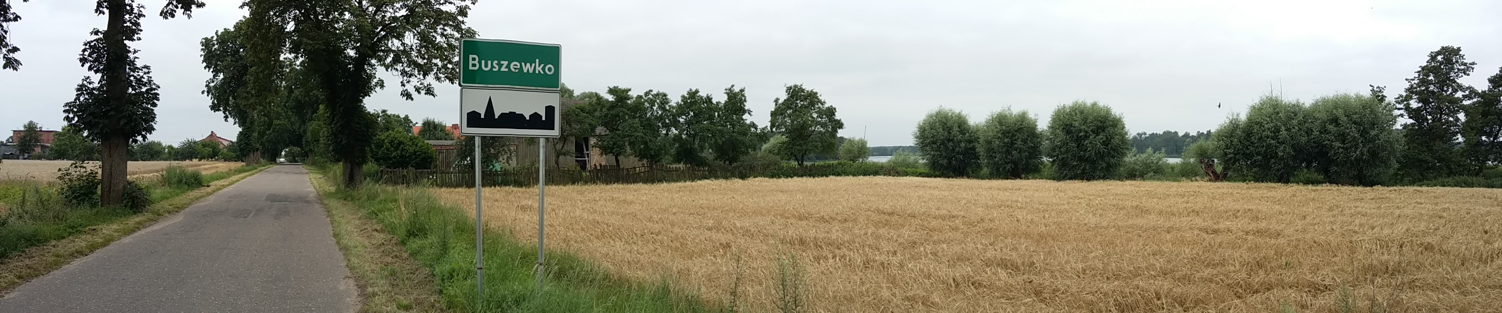 Panorama wsi.